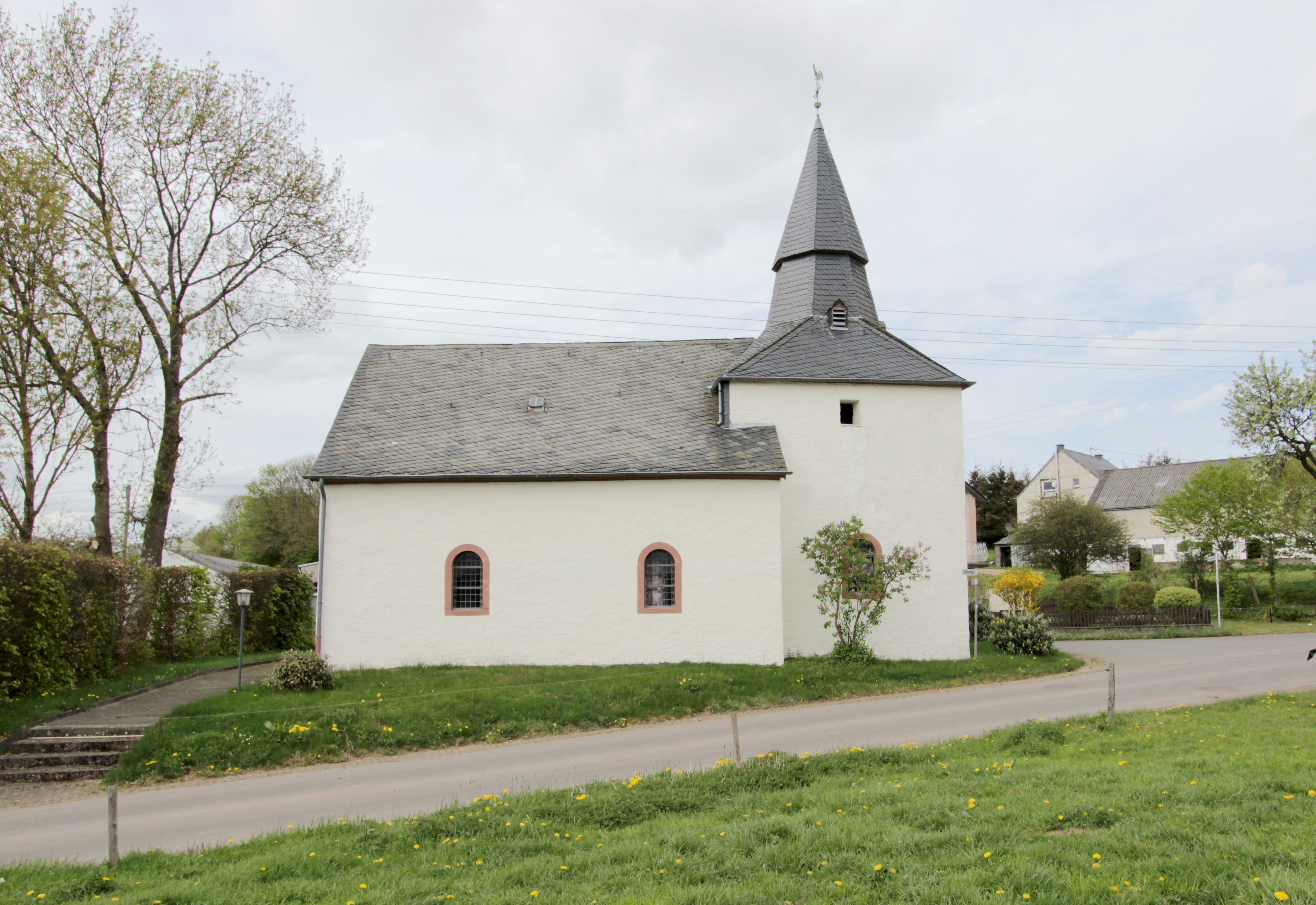 54673 Krautscheid, Kapellenstraße 1. Zweiachsiger Saalbau mit Chorturm, im Kern wohl romanisch (spätgotischen Rippen, Rundkonsolen und Wandsäulchen). Das einfache Schiff erhielt eine Holzlehmdecke mit Voute. Der einfache hölzerne Säulenaltar d. 18. Jahrhundert zeigt ein großes Mittelbild und seitliche Konsolen für die Figuren der heiligen Apollonia und Gertrud. Aufnahme von 2018.